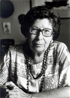 Dora Alonso, Escritora Cubana